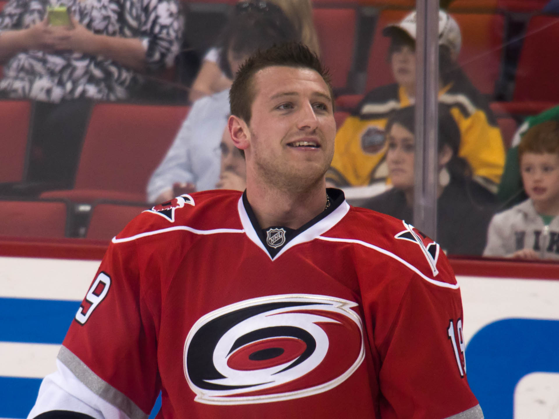 Jiří Tlustý, Czech ice hockey player